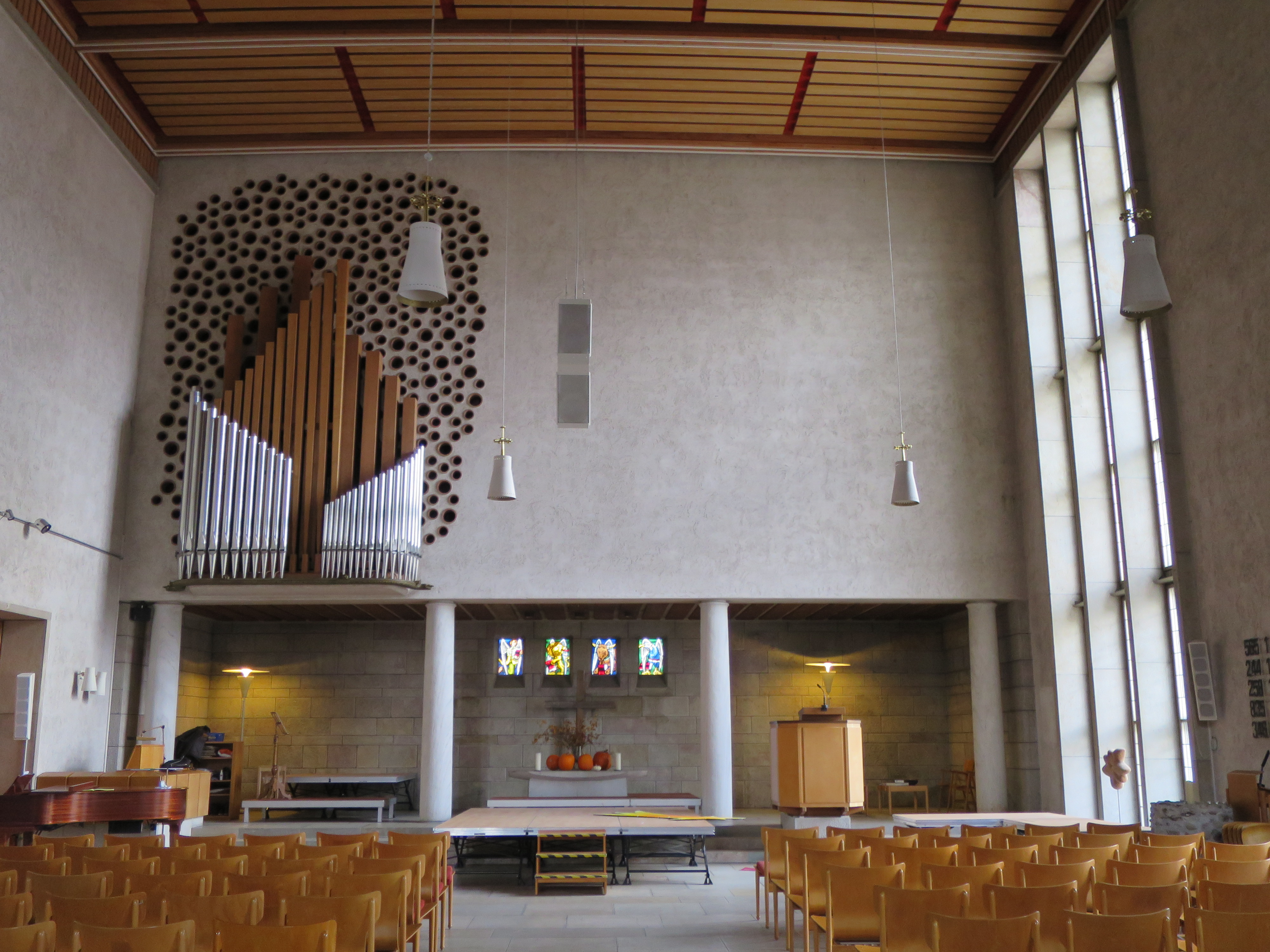 Reformierte Kirche Zürich-Balgrist (1951-52)